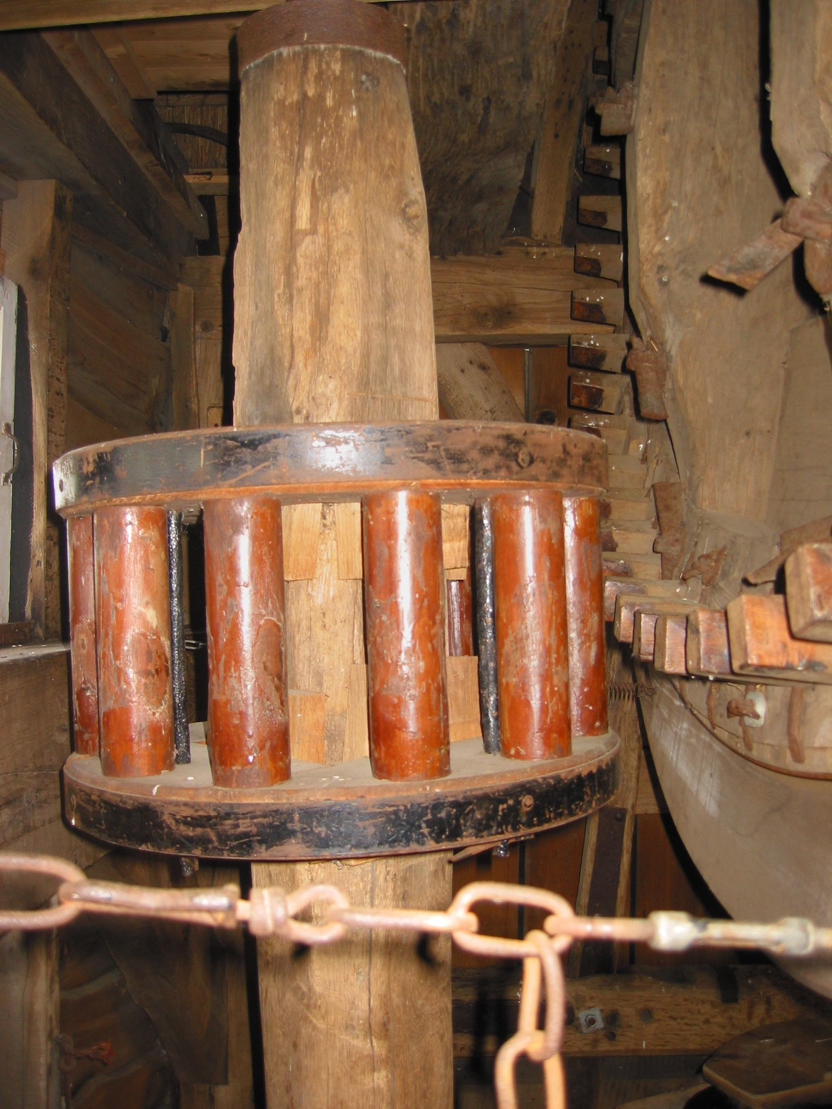 Doesburger molen aandrijving maalstoel, Ede, Nederland